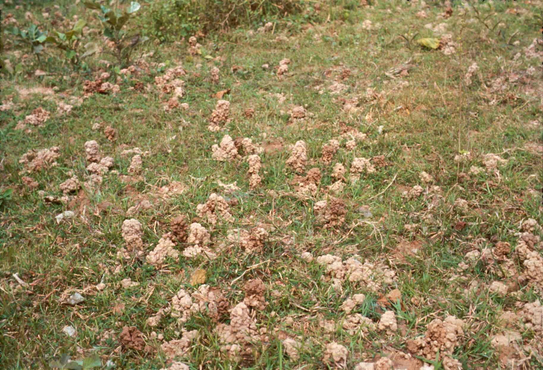 Forte concentration de turricules de Megascolecidae en région tropicale (Inde)